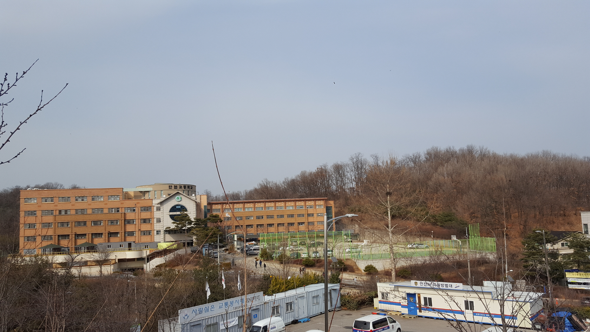 Ansan Danwon High School (16/02/27)